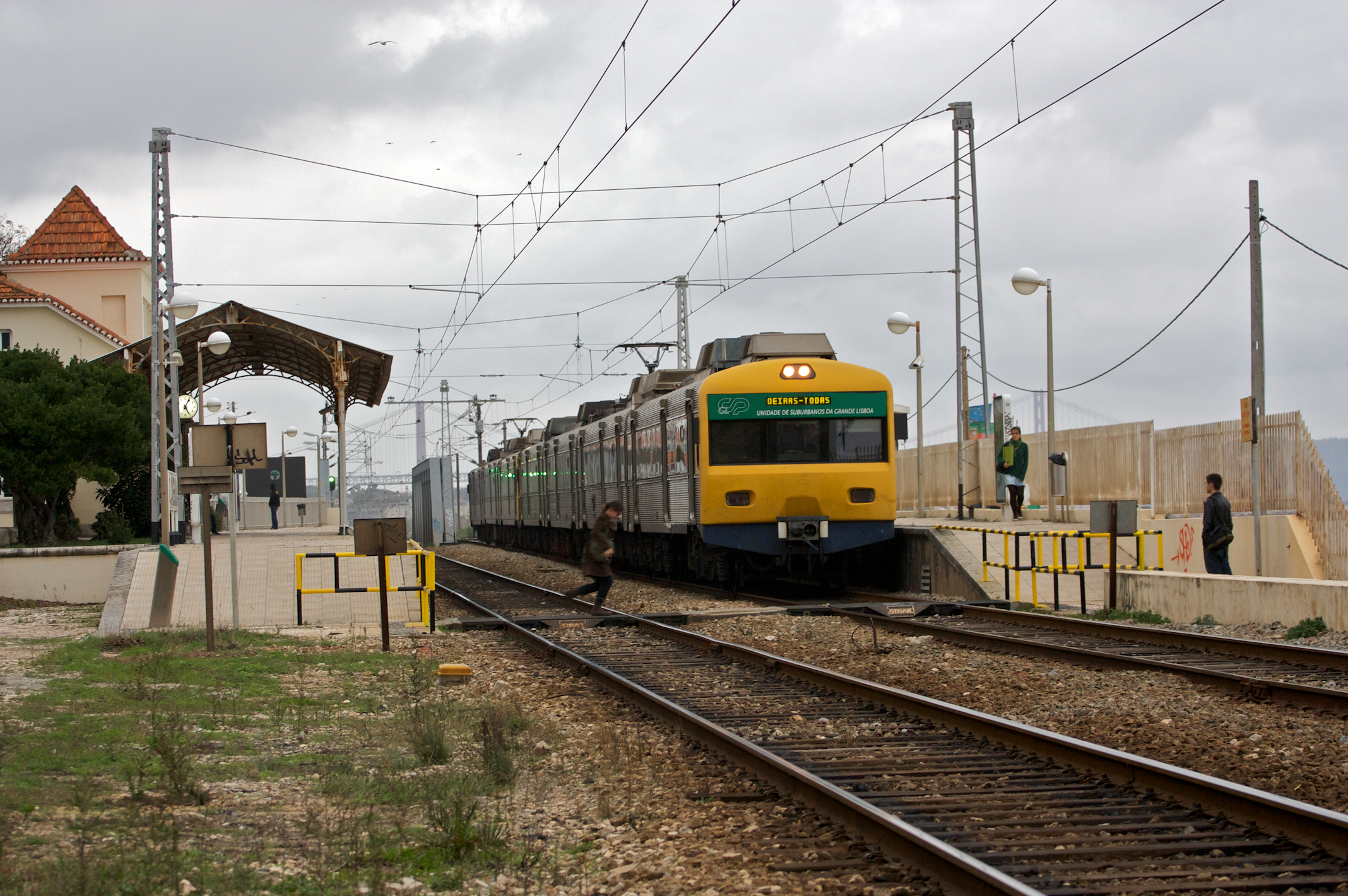 Tipo: Comboio Urbano 19723 [Cais do Sodré - Oeiras] Local: Apeadeiro de Cruz Quebrada [Linha de Cascais, PK 9] Data e hora: 13 de Novembro de 2009 [17h04] Material: Automotoras 3270 e 3154 [Unidade Quádrupla Eléctrica + Unidade Tripla Eléctrica]